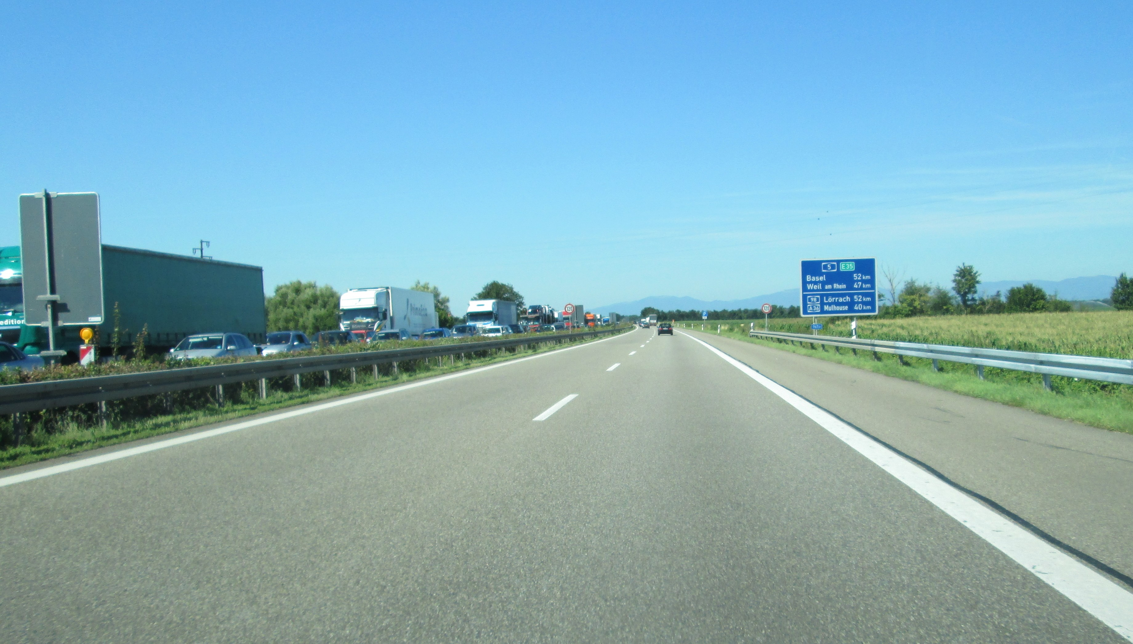 Route E35 en Allemagne